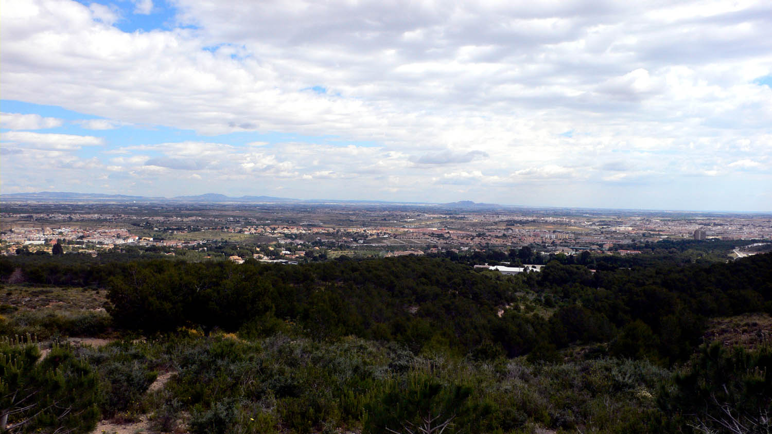 Llanura del Campo de Cartagena vista desde el Collado Roldán. En el centro el Cabezo Gordo de Torre Pacheco. Región de Murcia (Spain).